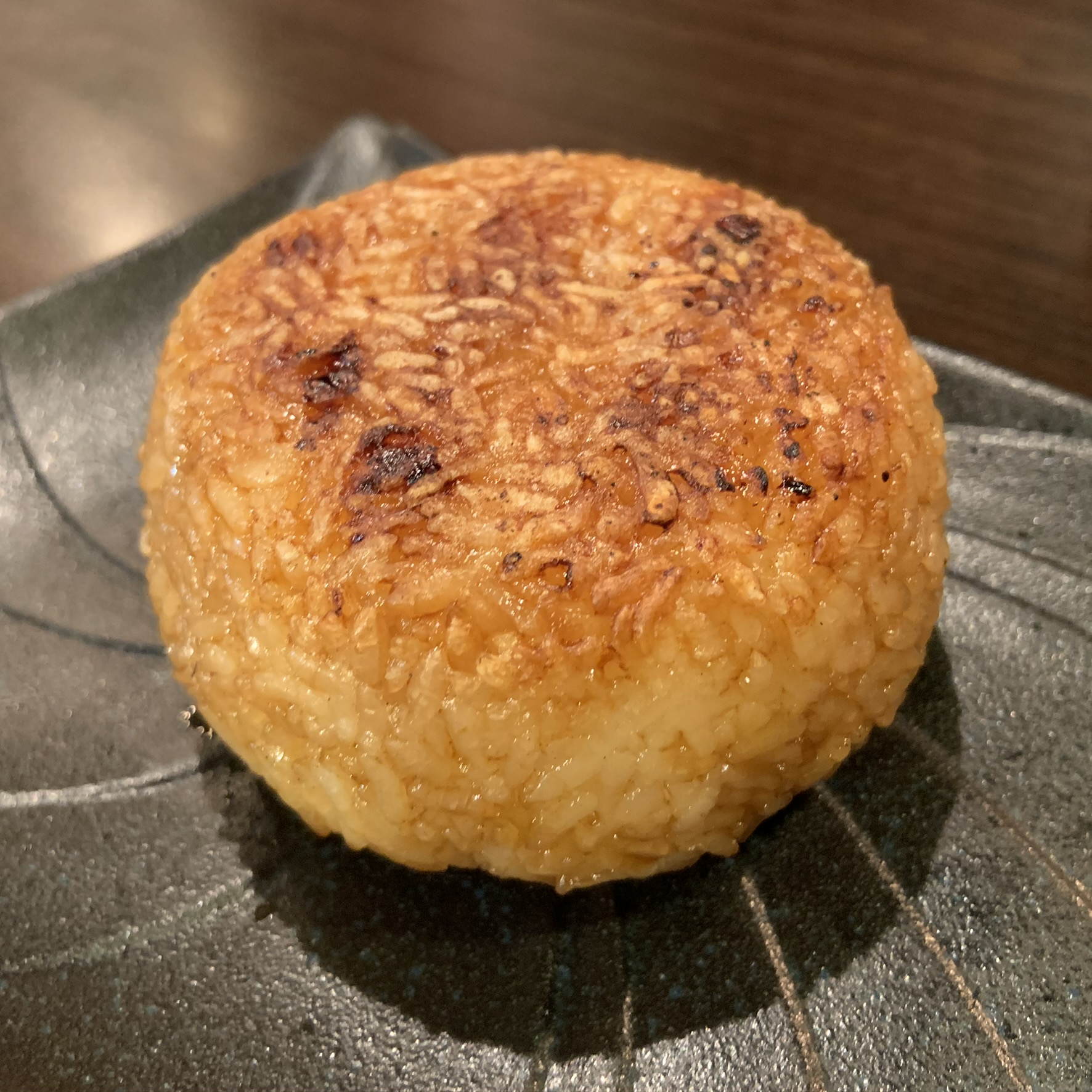 焼きおにぎり。2019年11月5日、鳥取市内の料理店で撮影。